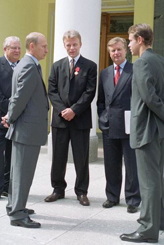 НОВО-ОГАРЕВО. С президентом Олимпийского комитета России Леонидом Тягачевым (второй справа), вице-президентом Международного олимпийского комитета Виталием Смирновым (слева), хоккеистами Вячеславом Фетисовым (в центре) и Павлом Буре.